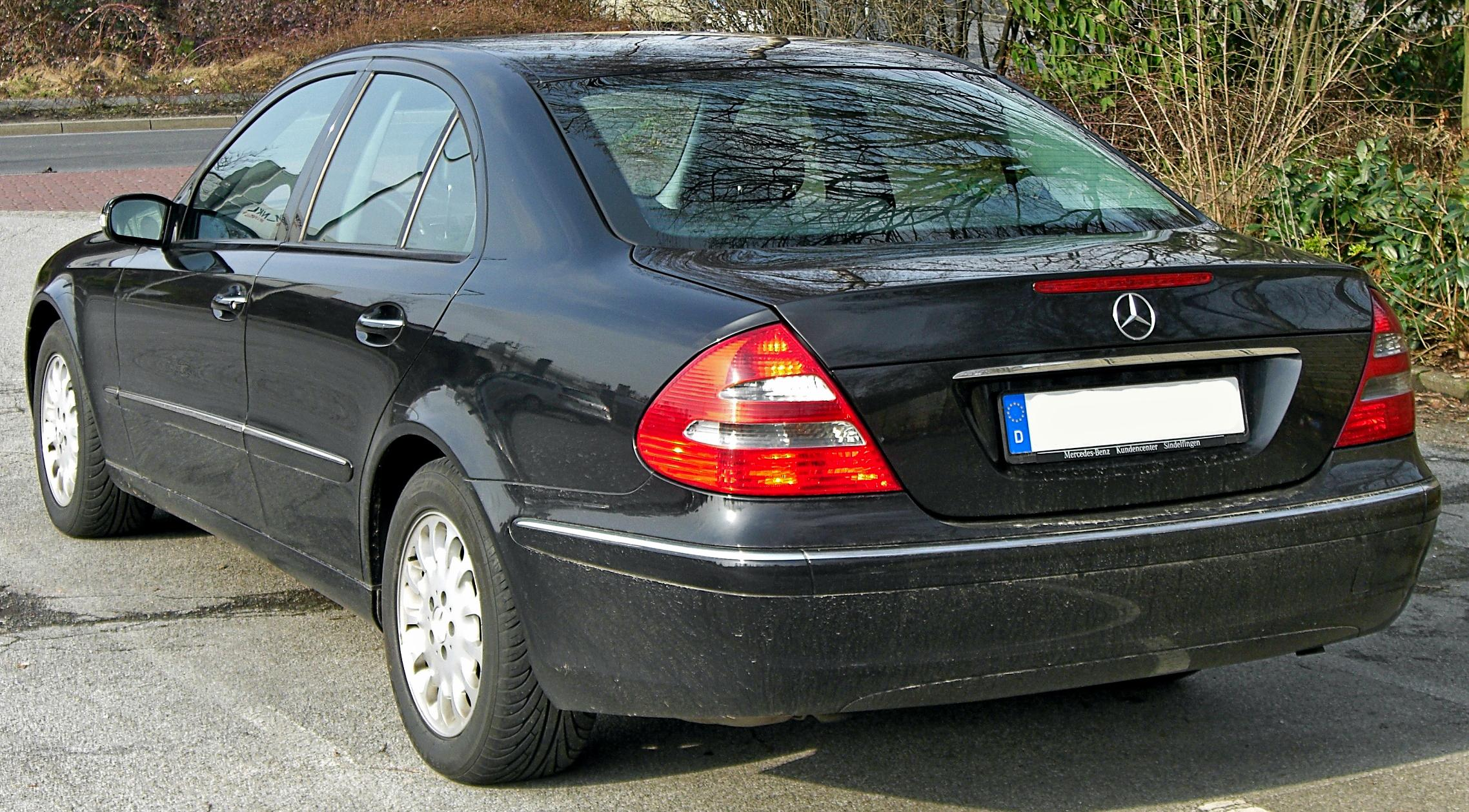 Mercedes E-Klasse